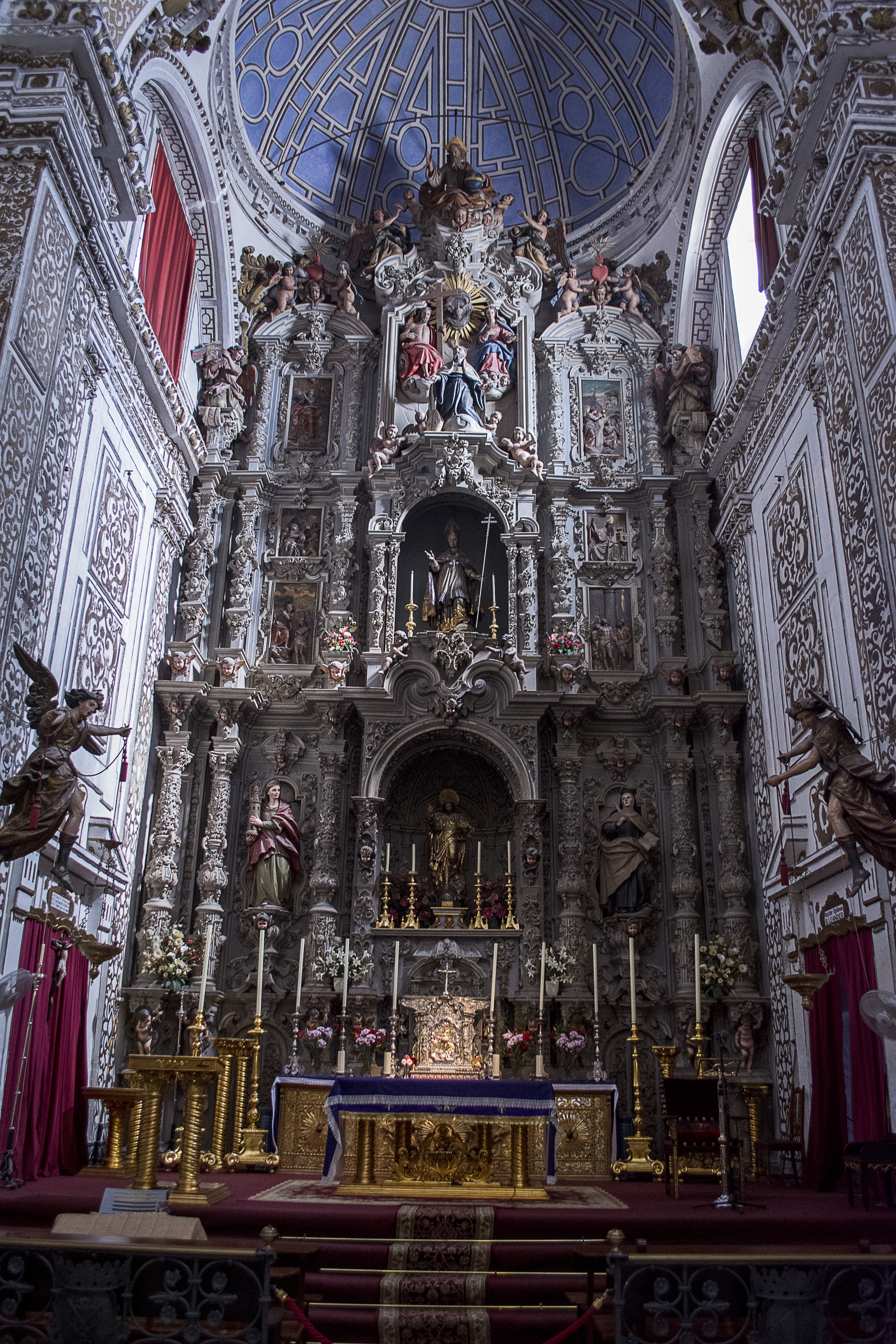 Retablo mayor de la iglesia del convento de San Leandro (Sevilla)